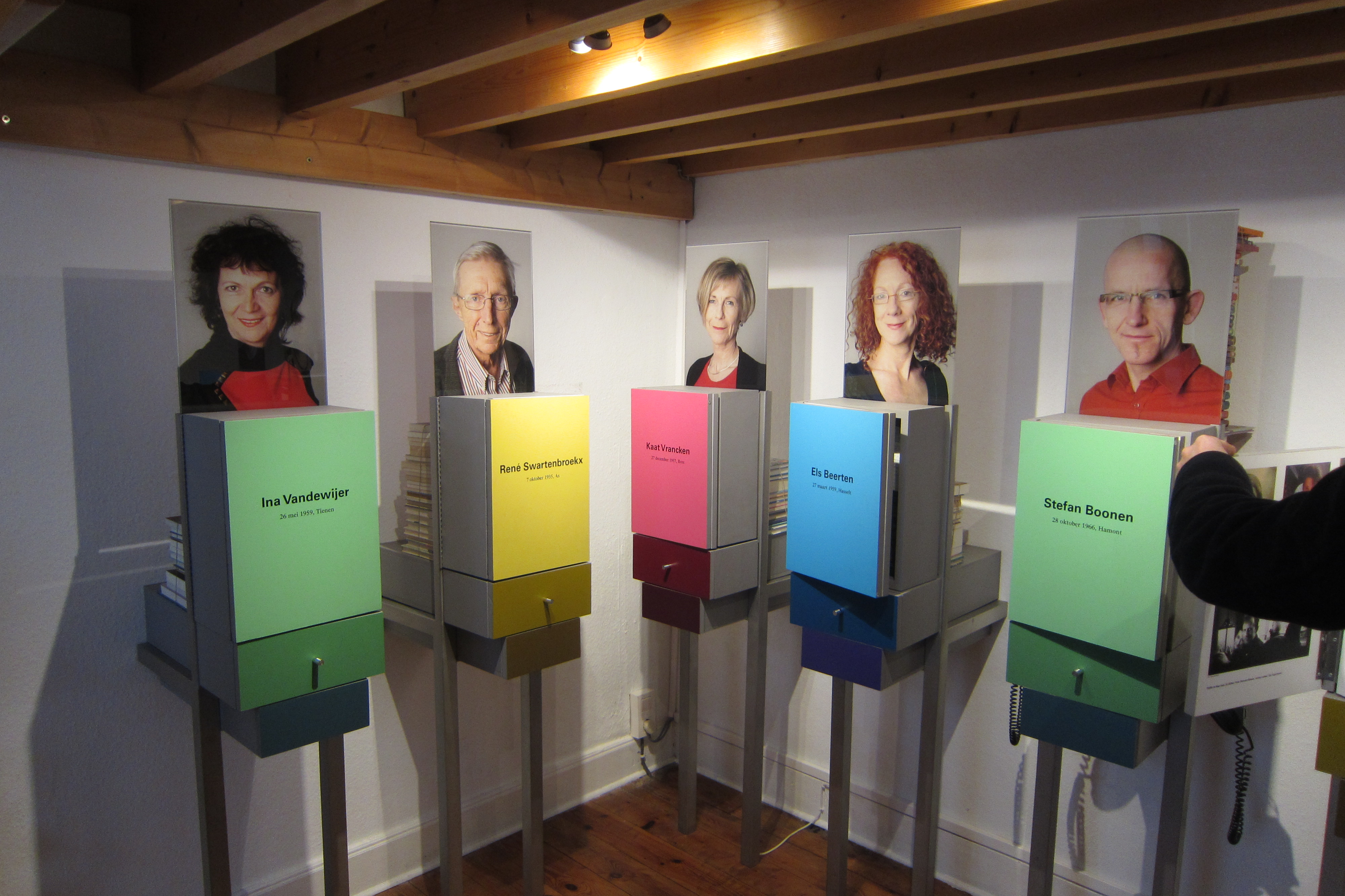 De Wonderkamer in het Literair Museum te Hasselt (België)